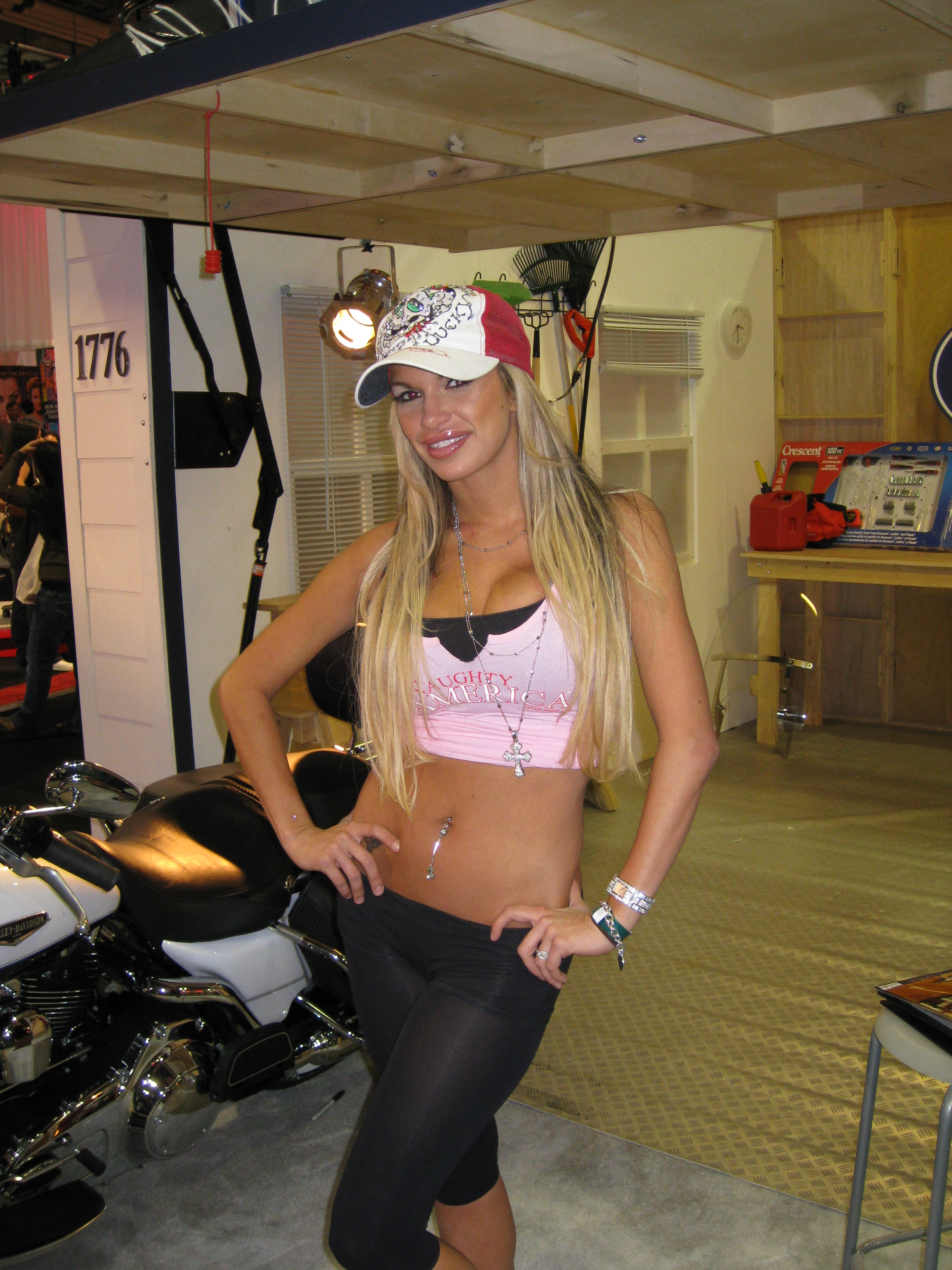 AEE2008_Day3 001